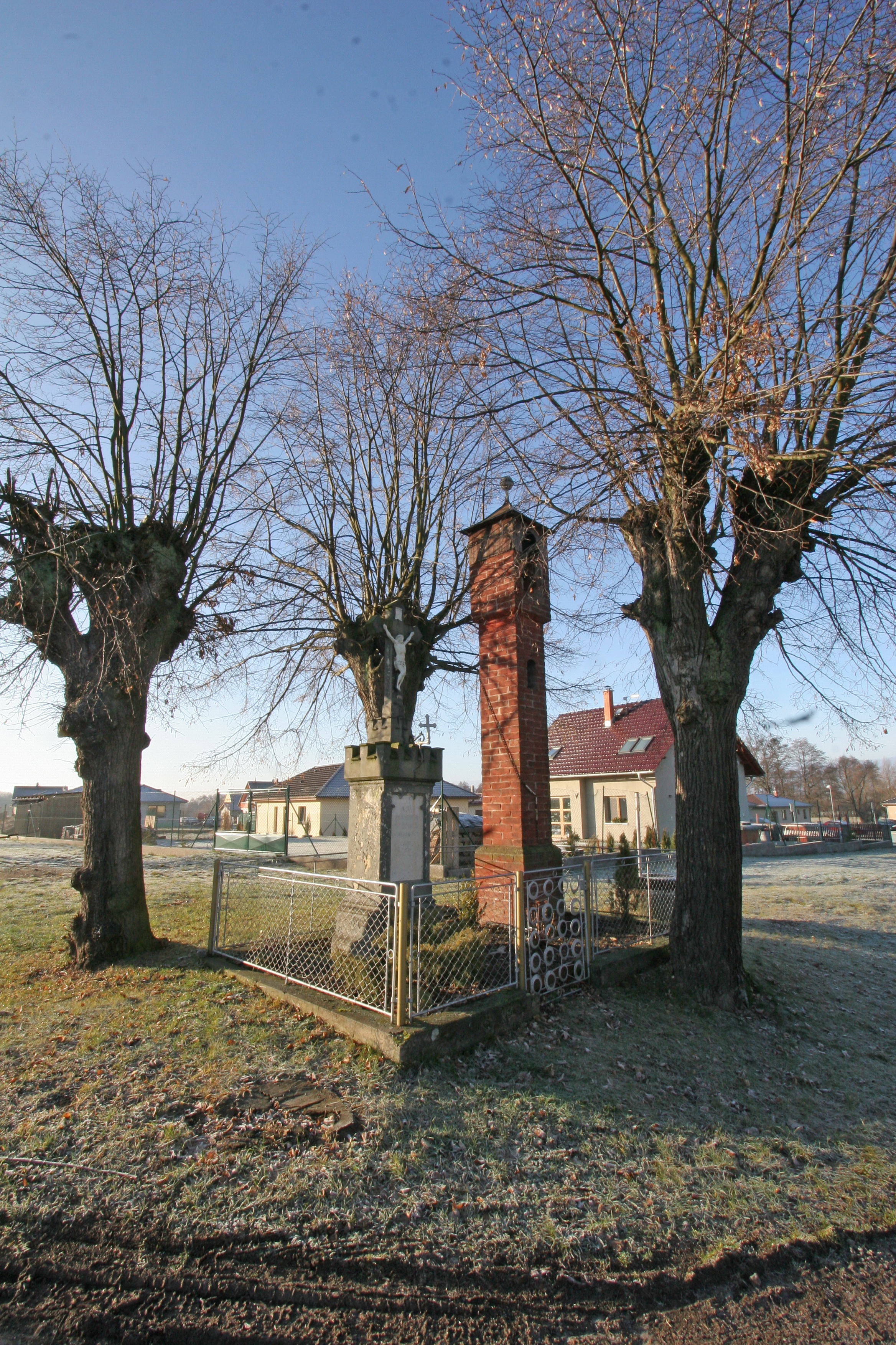 Homyle křížek a zvonička